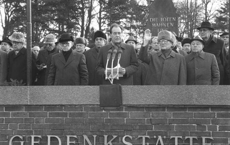 Berlin-Friedrichsfelde, Gedenkstätte ADN-ZB / Mittelstädt / 15.1.89 Berlin: Demonstration Mit einer Demonstration ehrten die Berliner das Vermächtnis von Karl Liebknecht und Rosa Luxemburg, die vor 70 Jahren ermordet worden waren. Die Ansprache in der Gedenkstätte der Sozialisten hielt das Mitglied des Politbüros und Sekretär des ZK der SED Joachim Herrmann. [Auf der Ehrentribüne v.l. u.a. Willi Stoph, Egon Krenz, Joachim Herrmann, Erich Honecker, Erich Mielke] Abgebildete Personen: Herrmann, Joachim: Chefredakteur der Zeitung Neues Deutschland, Sekretär des ZK der SED, DDR (GND 124676847) Honecker, Erich: Staatsratsvorsitzender, Generalsekretär des ZK der SED, DDR (GND 118553399) Mielke, Erich: Minister für Staatssicherheit, Armeegeneral, Politbüro des Zentralkomitees (ZK) der SED, DDR (GND 118977490) Stoph, Willi: Ministerpräsident, Staatsratsvorsitzender, Armeegeneral, SED, DDR (GND 118975714)